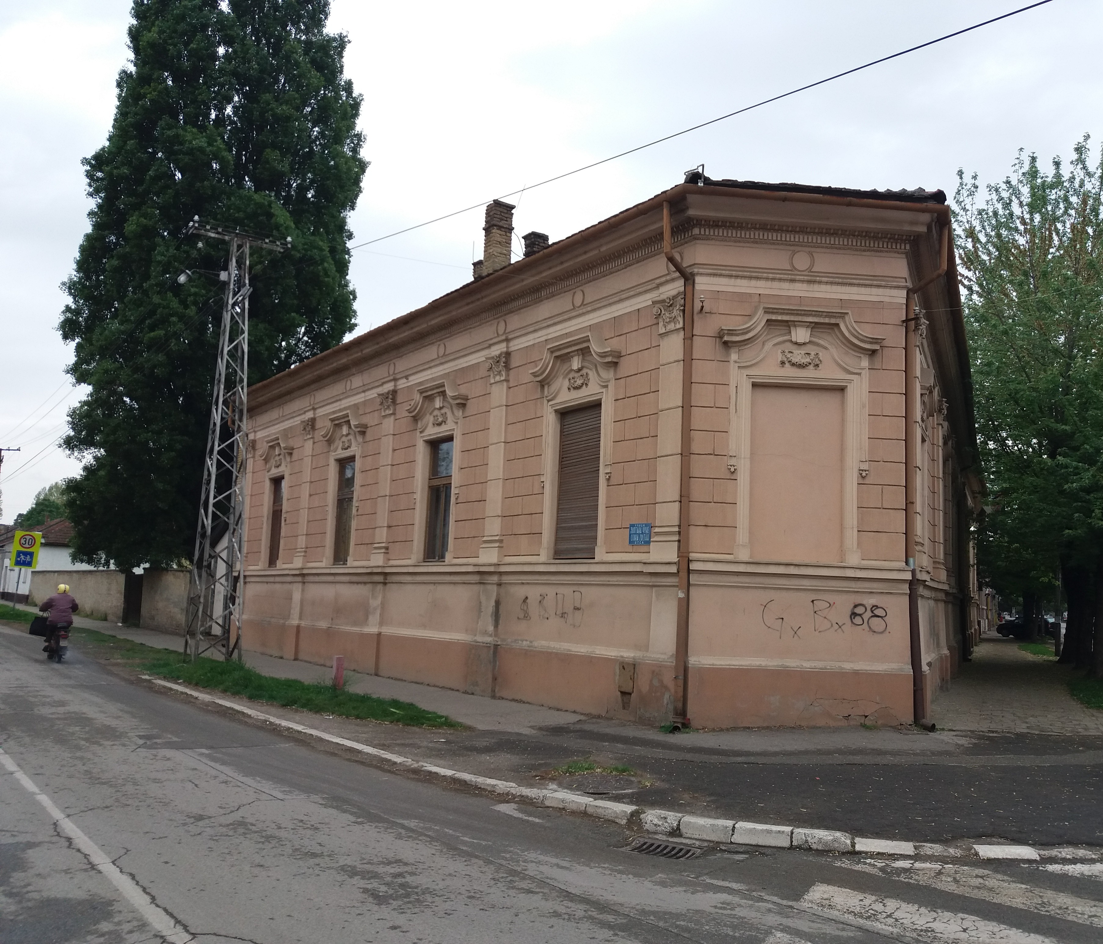 Srpski (latinica): Gradski muzej Bečej